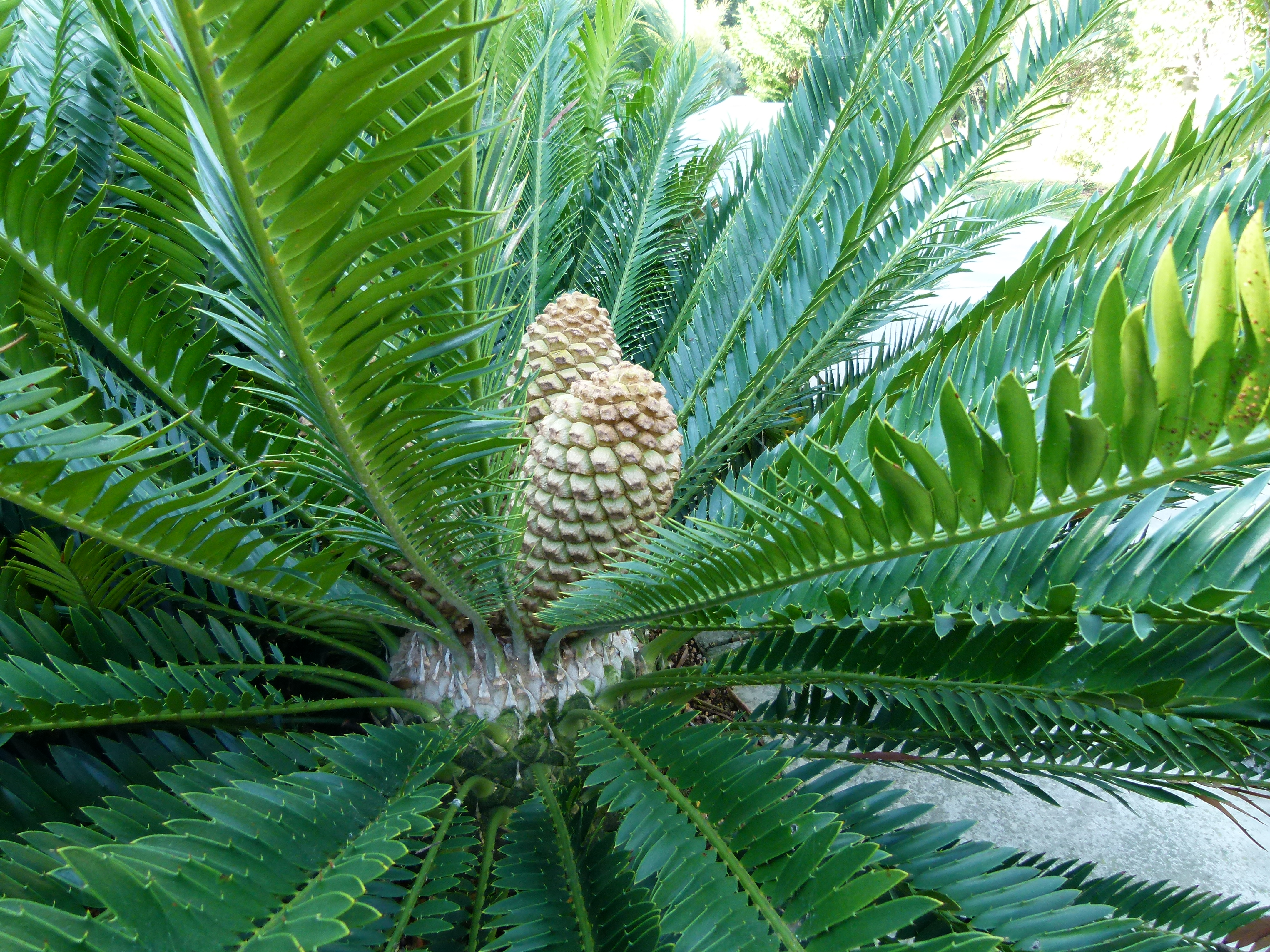 Jardin botanique Montjuic, Barcelone